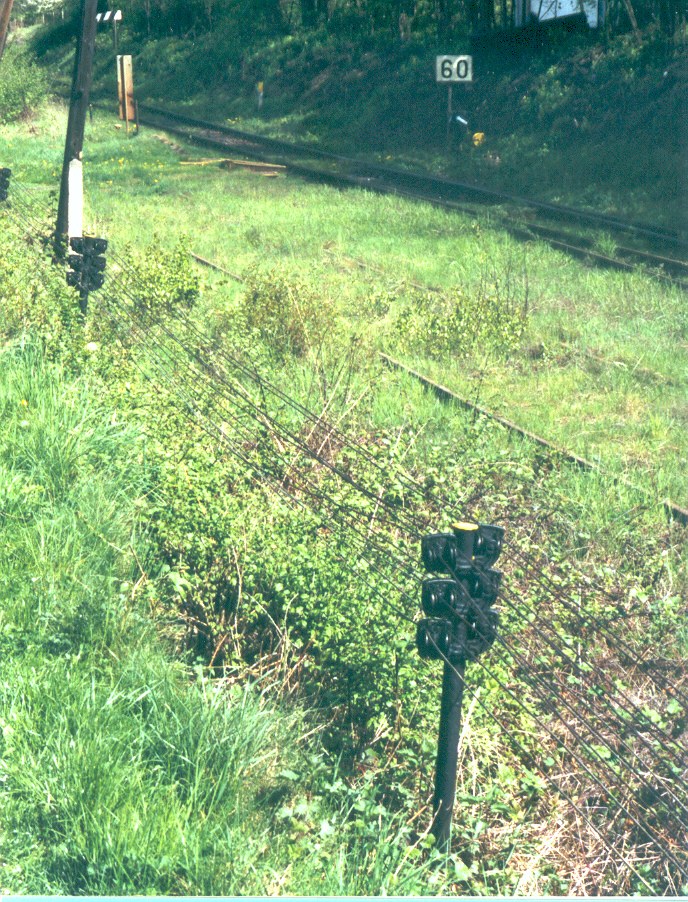 Drahtzugleitungen mit Führungsrollen, altösterreichische Bauform. Abzweig Skochovice, KBS ČD 210